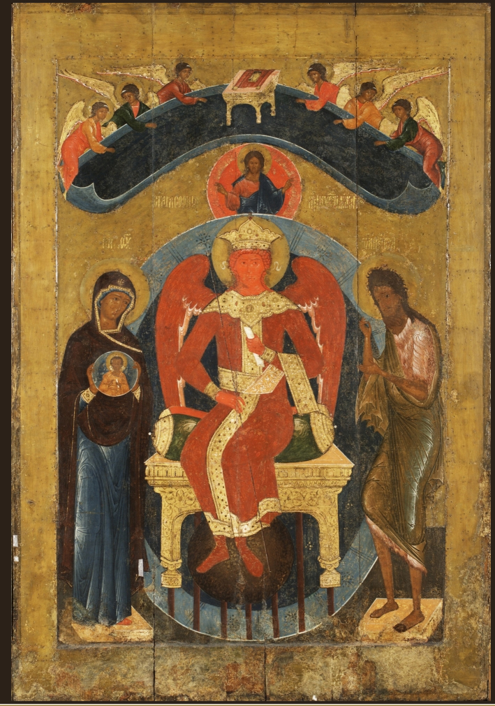 Храмовая икона Софийского собора в Вологде. СОФИЯ ПРЕМУДРОСТЬ СЛОВА БОЖИЯ, Происхождение: Из иконостаса Софийского собора Вологды. Материал: Дерево, паволока, левкас, темпера Размеры иконы: высота 195,5 см, ширина 133 см Фигура Софии Премудрости Божией с огненно красным ликом и огненно-красными крыльями, в золотой короне и красно-золотых одеждах представлена на престоле. По сторонам от трона стоят Богоматерь и Иоанн Предтеча. Над Софией расположен медальон с полуфигорой Христа, благословляющего архиерейским благословением (двумя руками). Выше представлен небесный свод с Этимасией (Уготованным престолом), на которую возложено Евангелие; по сторонам Этимасии – ангелы. Вологодский государственный историко-архитектурный и художественный музей-заповедник